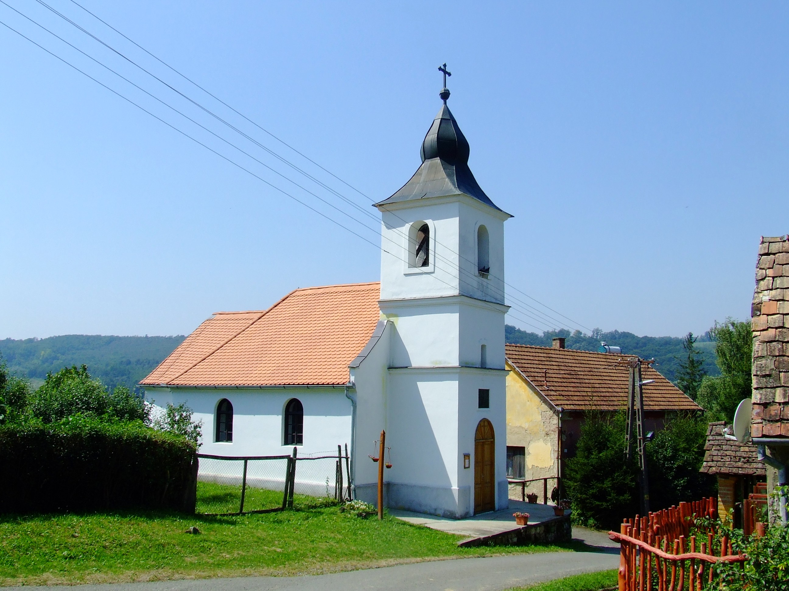 A husztóti Szent Teréz-templom. Épült 1868-ban